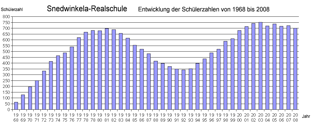 Schülerzahl der Snedwinkela-Realschule von 1968 bis 2008